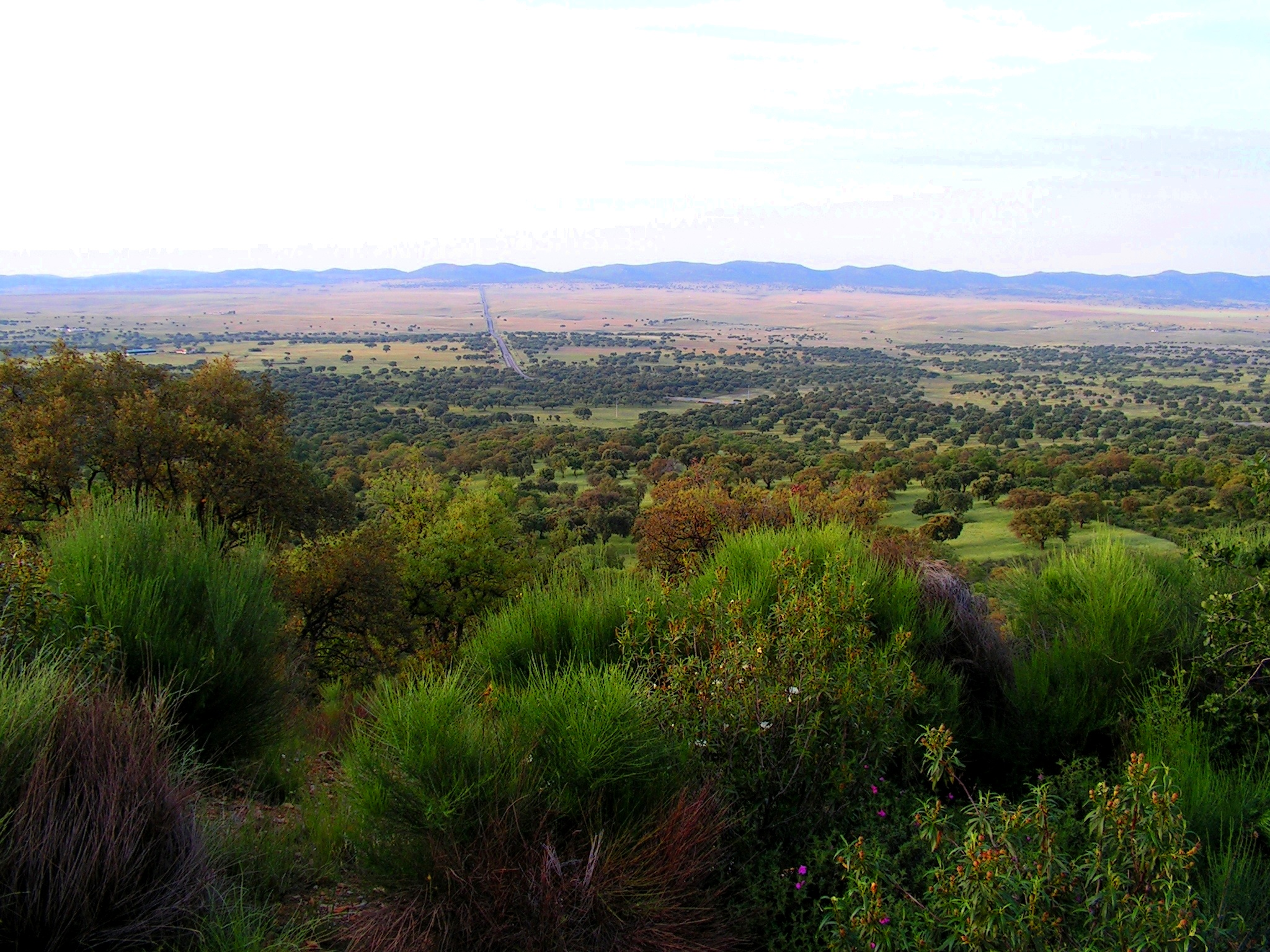 Foto panorámica del Valle de Alcudia.